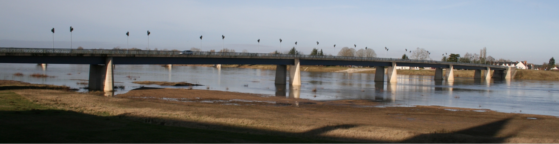 Pont de Sully-sur-Loire (Loiret - France)